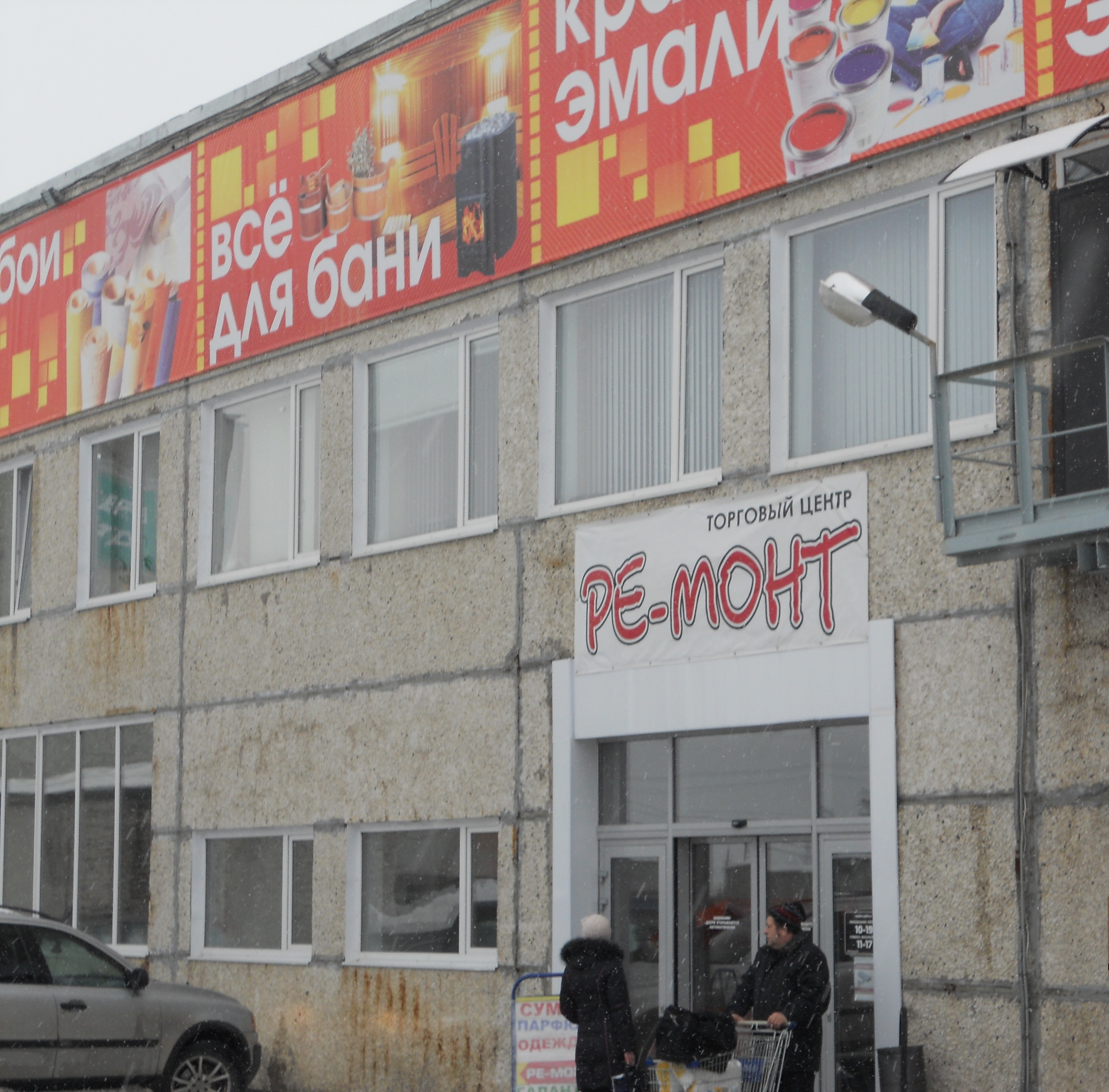 Улица Строителей РеМонт